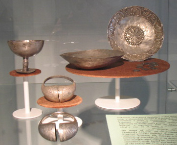 Zemiansky Vrbovok, Korponai járás (Okres Krupina). Avar kincslelet darabjai egy pozsonyi kiállításon